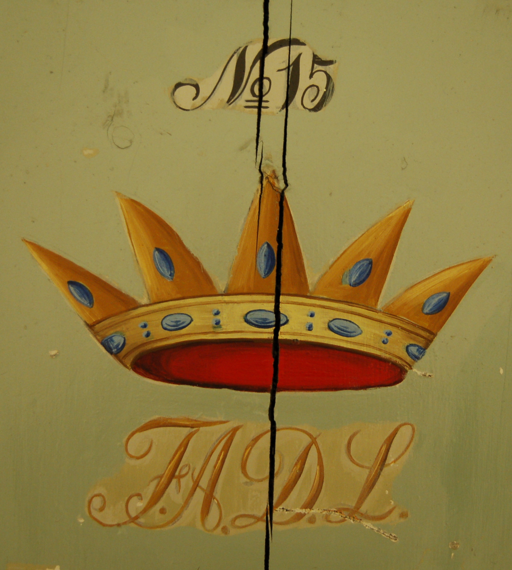 Initialene til Ferdinand Anton Danneskjold-Laurvig i Hospitalet i Larvik